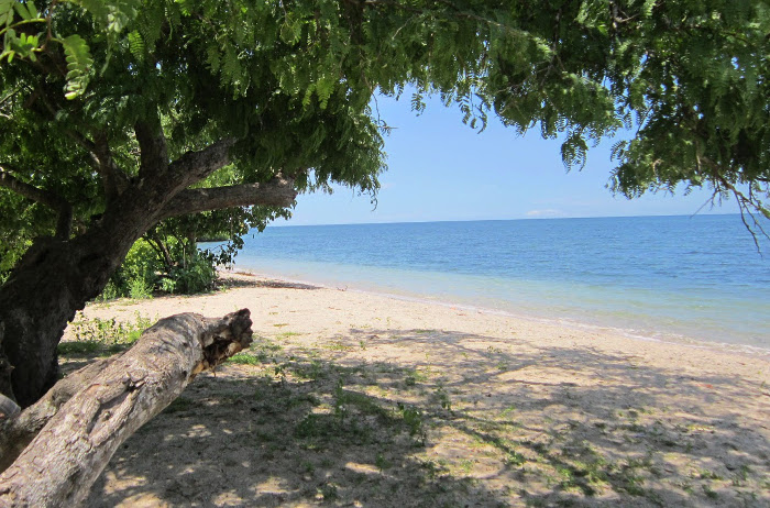 Basa Jawa: Taman Nasional Baluran, Situbondo, Banyuwangi, Jawa Timur